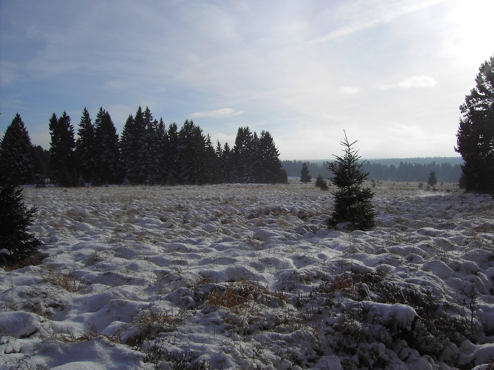 Kutenhard